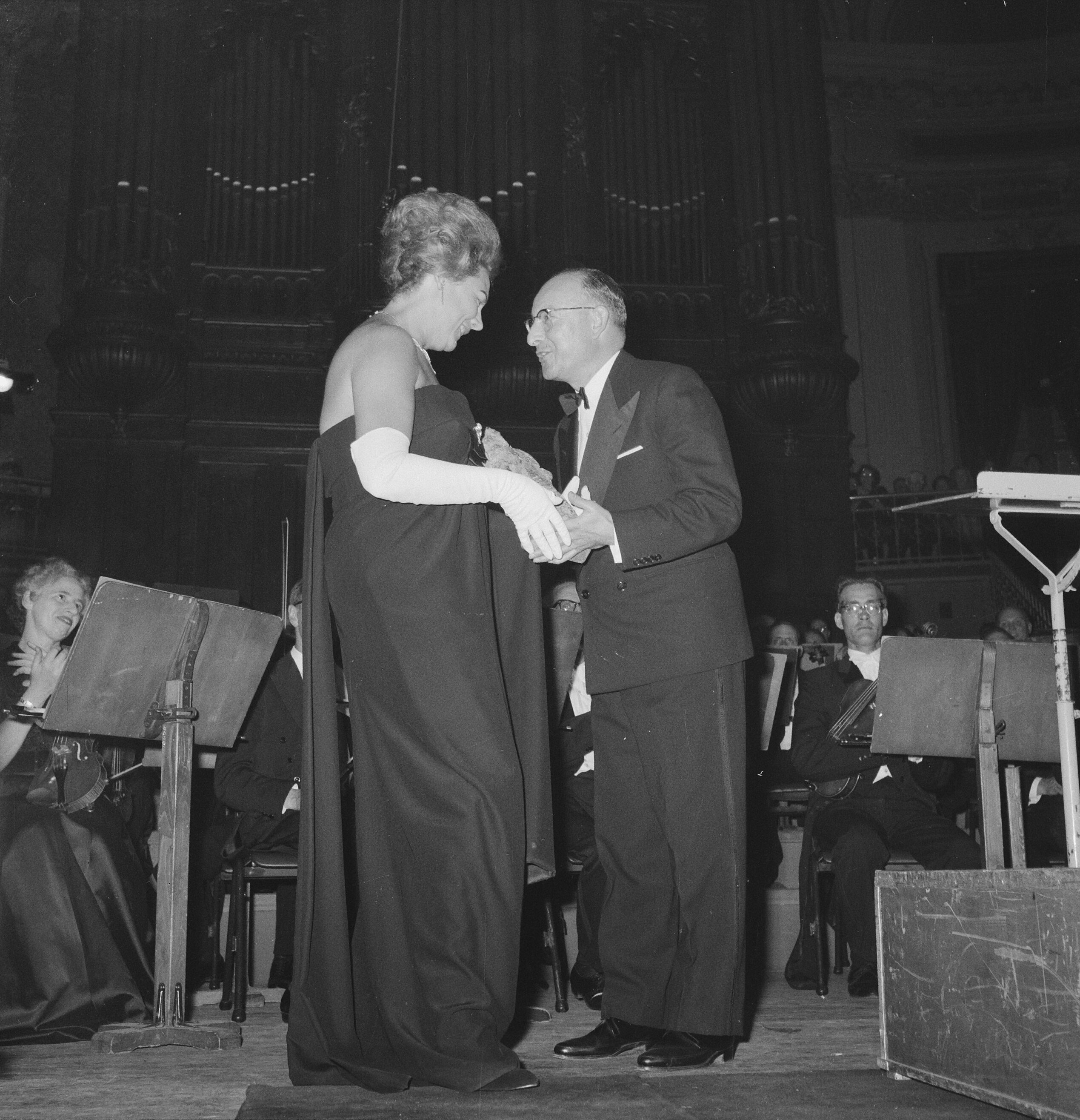 Collectie / Archief : Fotocollectie Anefo Reportage / Serie : [ onbekend ] Beschrijving : Grand Gala du Disque , Renata Tebaldi neemt Edison in ontvangst Datum : 28 september 1962 Trefwoorden : Ontvangsten Persoonsnaam : Tebaldi, Renata Fotograaf : Nijs, Jac. de / Anefo Auteursrechthebbende : Nationaal Archief Materiaalsoort : Negatief (zwart/wit) Nummer archiefinventaris : bekijk toegang 2.24.01.03 Bestanddeelnummer : 914-3538 Reacties Geplaatst door Maaike op 25 augustus 2012 - 17:10. Grand Gala du Disque Klassiek. Concertgebouw te Amsterdam